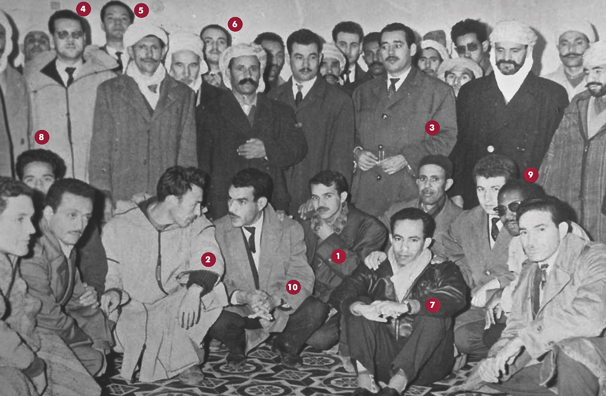 Clan d'Oujda en 1958 Clan d'Oujda. (1958)1-Commandant Bouteflika(alias Abdelkader El Mali).2-Colonel Boukharouba (alias Boumédiène).3-Colonel Ali Kafi.4-Colonel Boussouf (alias Si Mabrouk).5-Colonel Mostafa Benaouda.6-Colonel Boudghène (alias Lotfi).7-Commandant Rouai (alias Toufik)8-Commandant Rachid (alias Mostghalemi)9-L'ambassadeur Laâla.10-Mohamed Boudaoud (alias Mensour).En arrière-plan : des cadres et des militants.